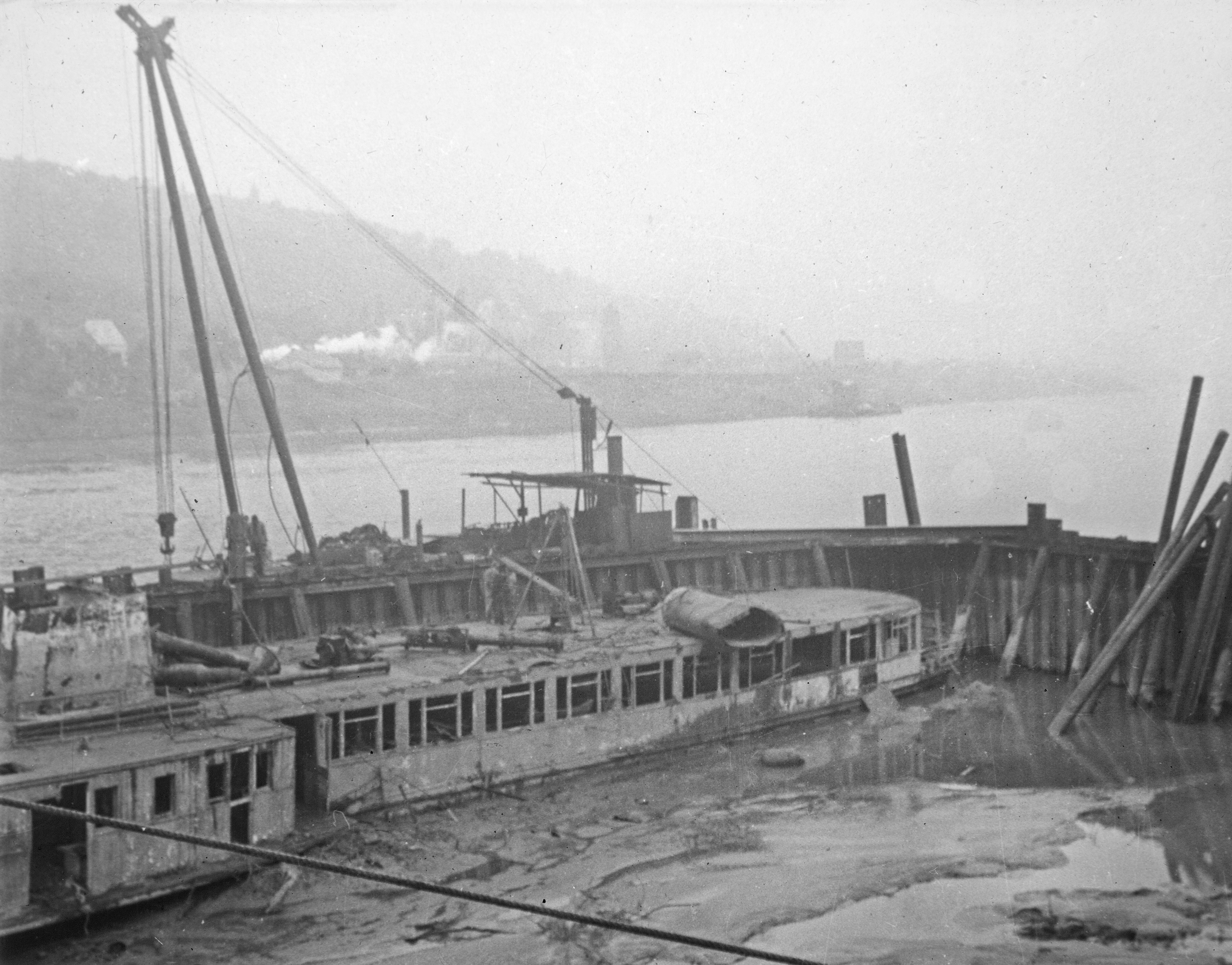 Originaltitel: "Bergung des Salondampfers "Westmark" in Unkel/Rhein" Originalbeschreibung: "Der 1883 gebaute Raddampfer fuhr zunächst unter dem Namen "Bismarck", später "Freiherr vom Stein", ab Umbau 1937 unter "Westmark", fasste danach 2150 Fahrgäste. Anfang März 1945 wurde das Schiff im Hafen von Unkel versenkt. Das Wrack wurde 1949 eingespundet, das Spundkarree ausgepumpt, das Schiffsleck abgedichtet und das Karree wieder geflutet (Bild), wodurch es schwimmend zur Werft Duisburg gebracht werden konnte"